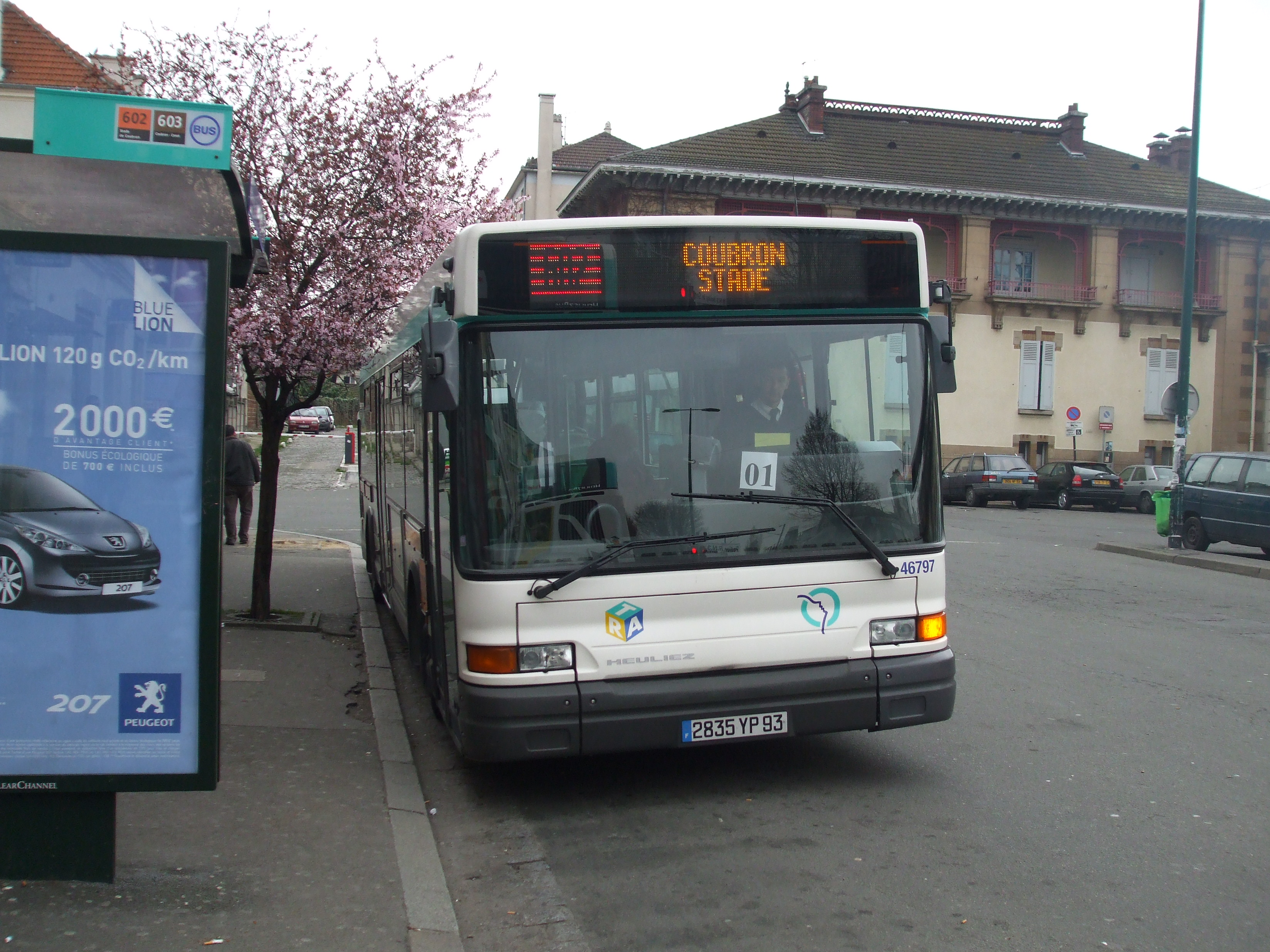 Photographie personnelle. Autobus GX317 de la ligne RATP 602 au Raincy.